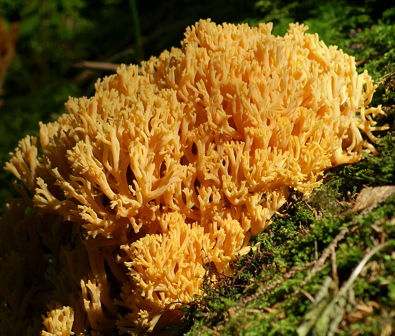 Goldgelbe Koralle (Ramaria aurea)